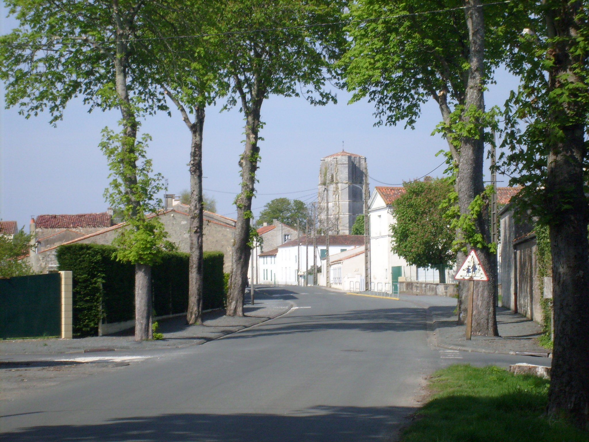 L'entrée du village de Saint-Jean-d'Angle